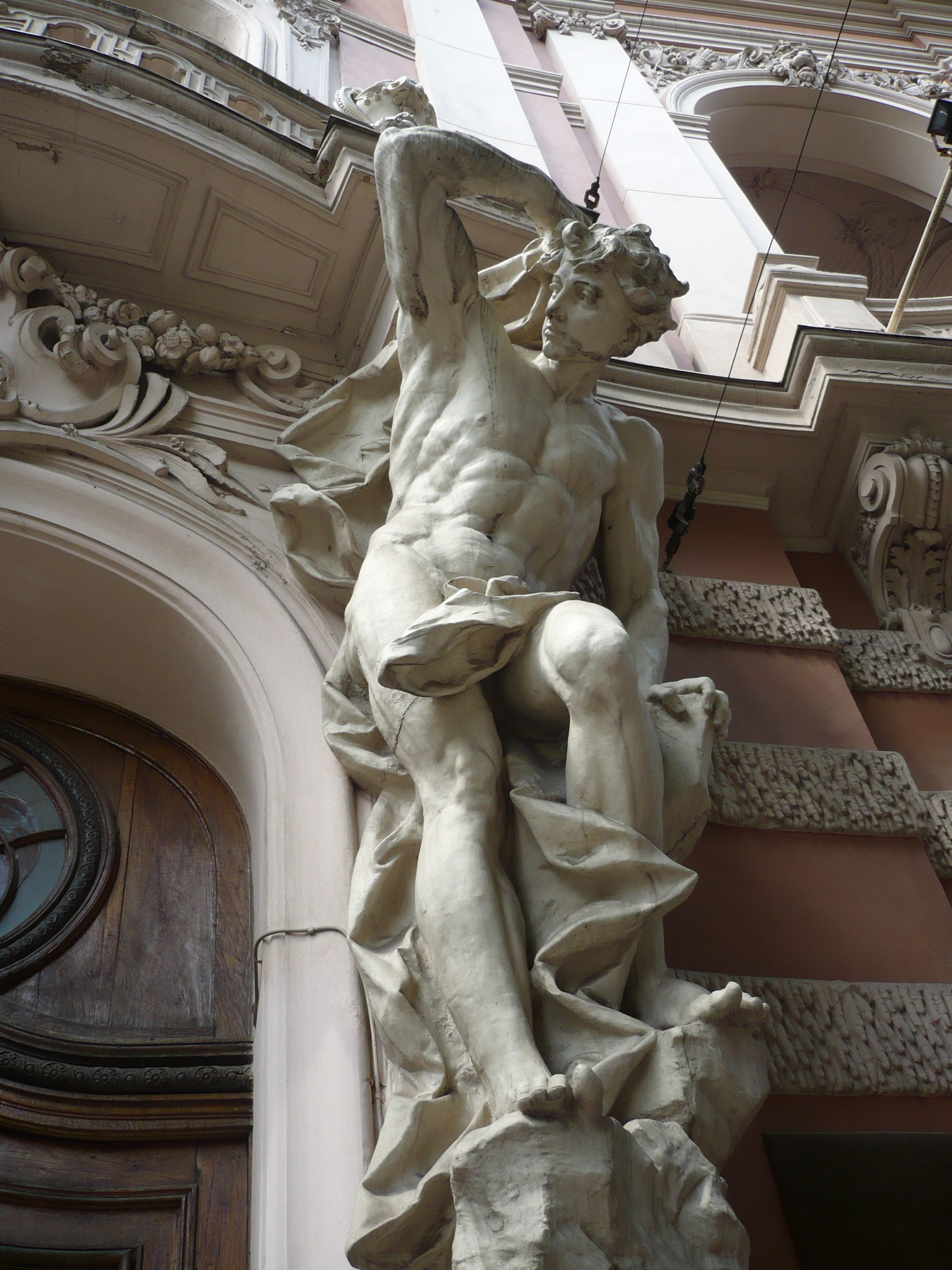 Lwów, ul. Czynu Listopadowego 6 - atlant z portalu dawnego Kasyna Szlacheckiego, zwanego także: Narodowym, Ziemiańskim, Końskim (zbud. 1897-98). Obecnie Dom Uczonych